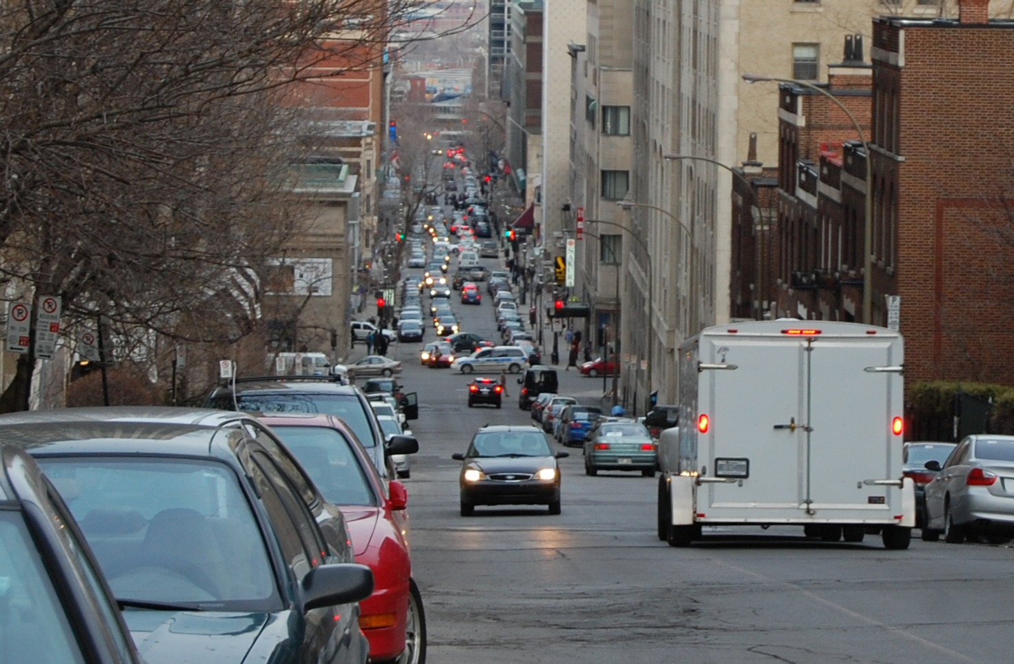 Rue de la Montagne, Montréal